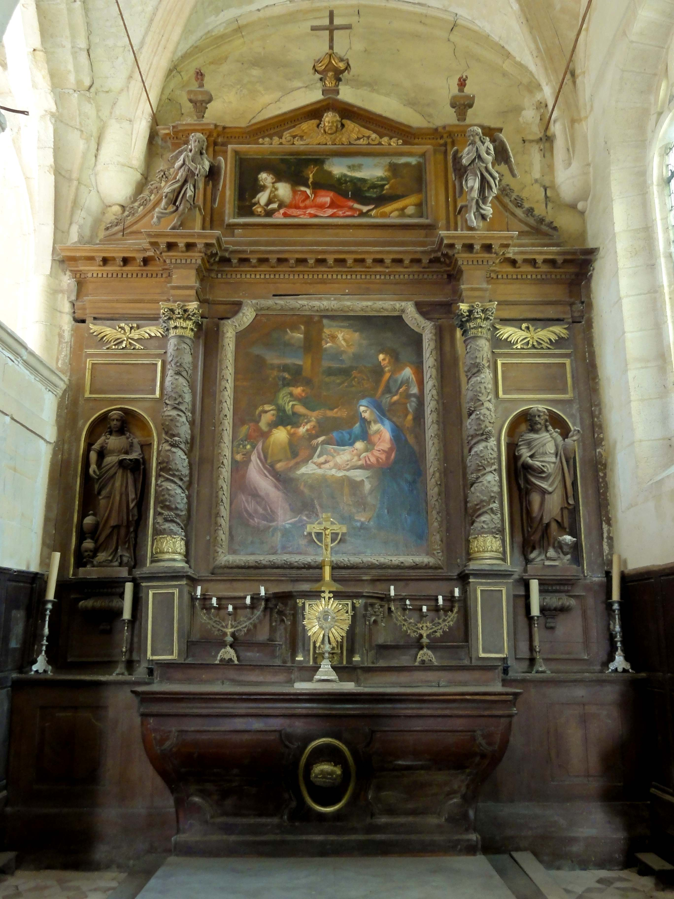 Mobilier de l'église (voir titre).